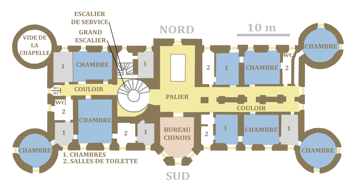 Plan du premier étage du château de Challain, Maine-et-Loire, France.